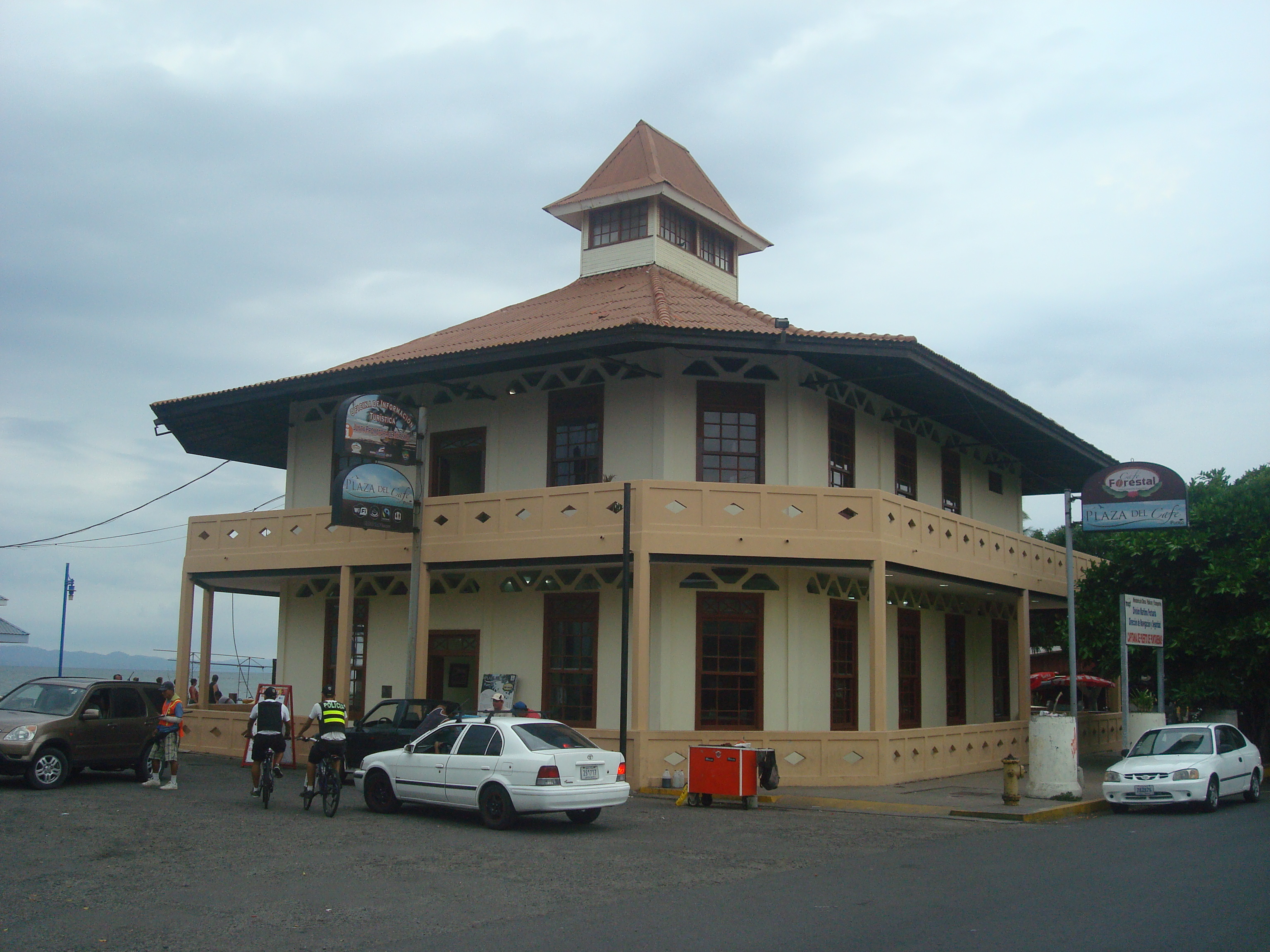 Edificio de la antigua Capitanía del puerto de Puntarenas, uno de los edificios históricos y emblemáticos de esa ciudad costarricense.